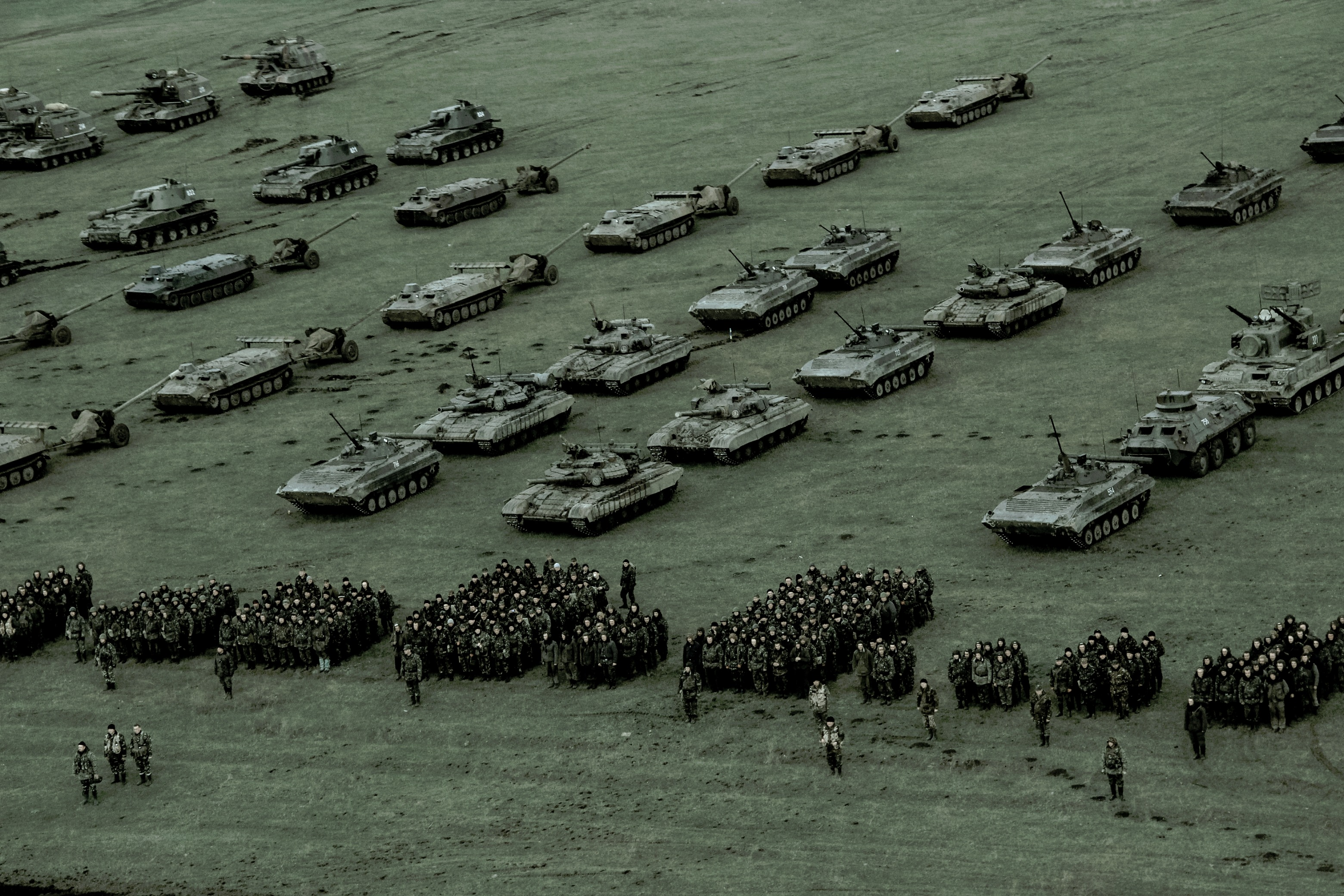 «Найкраща армія, яка коли-небудь була в Україні. Зміни у Збройних Силах України з часу початку російської агресії»